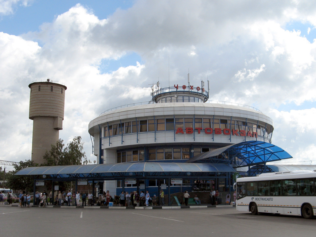 автовокзал в г. Чехов (Московская область); bus station in Chekhov (Moscow Oblast)